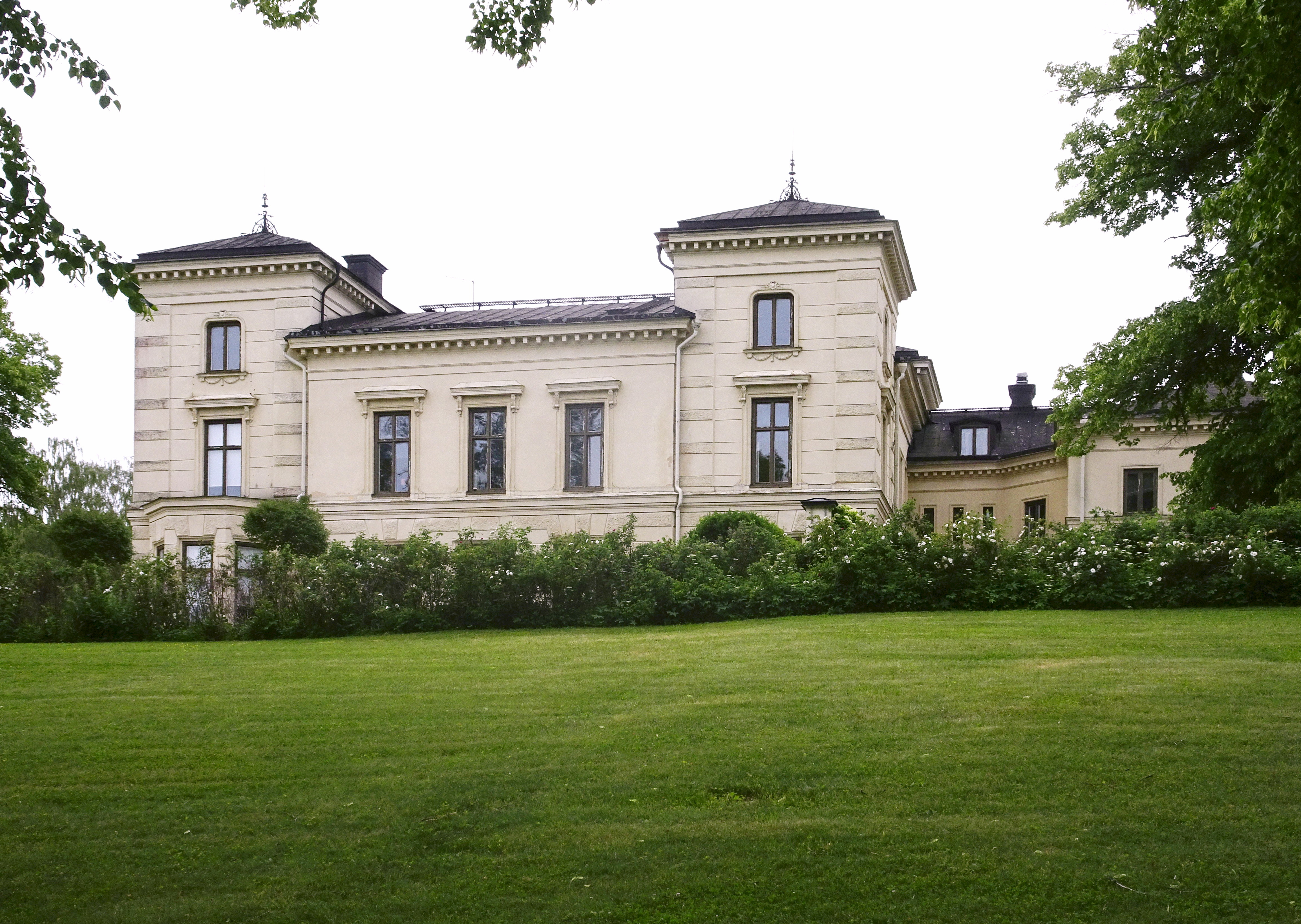 Fånö herrgård, huvudbtggnad